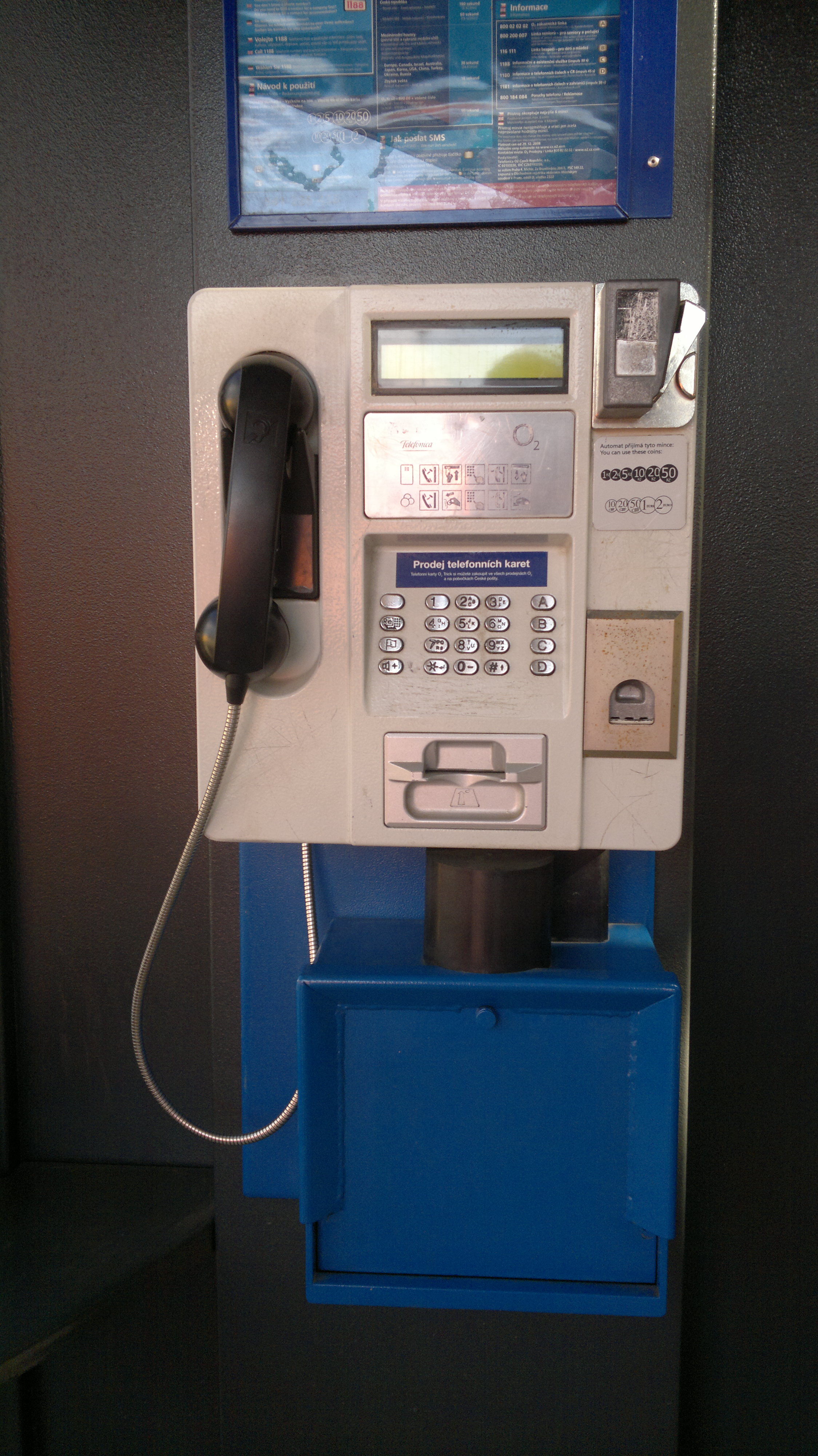 Veřejný telefonní automat (VTA) umístěný v Brně-Řečkovicích.